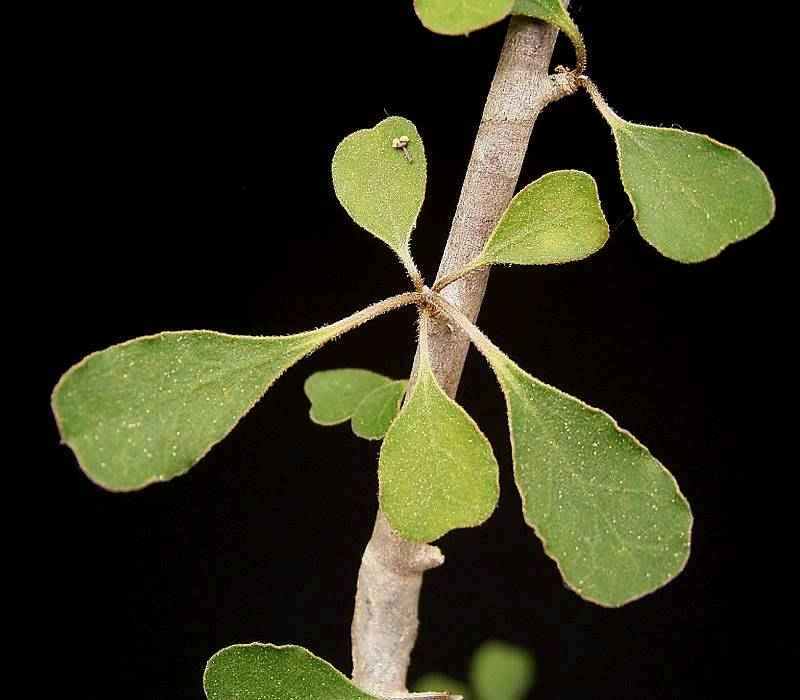 Euphorbia denisii